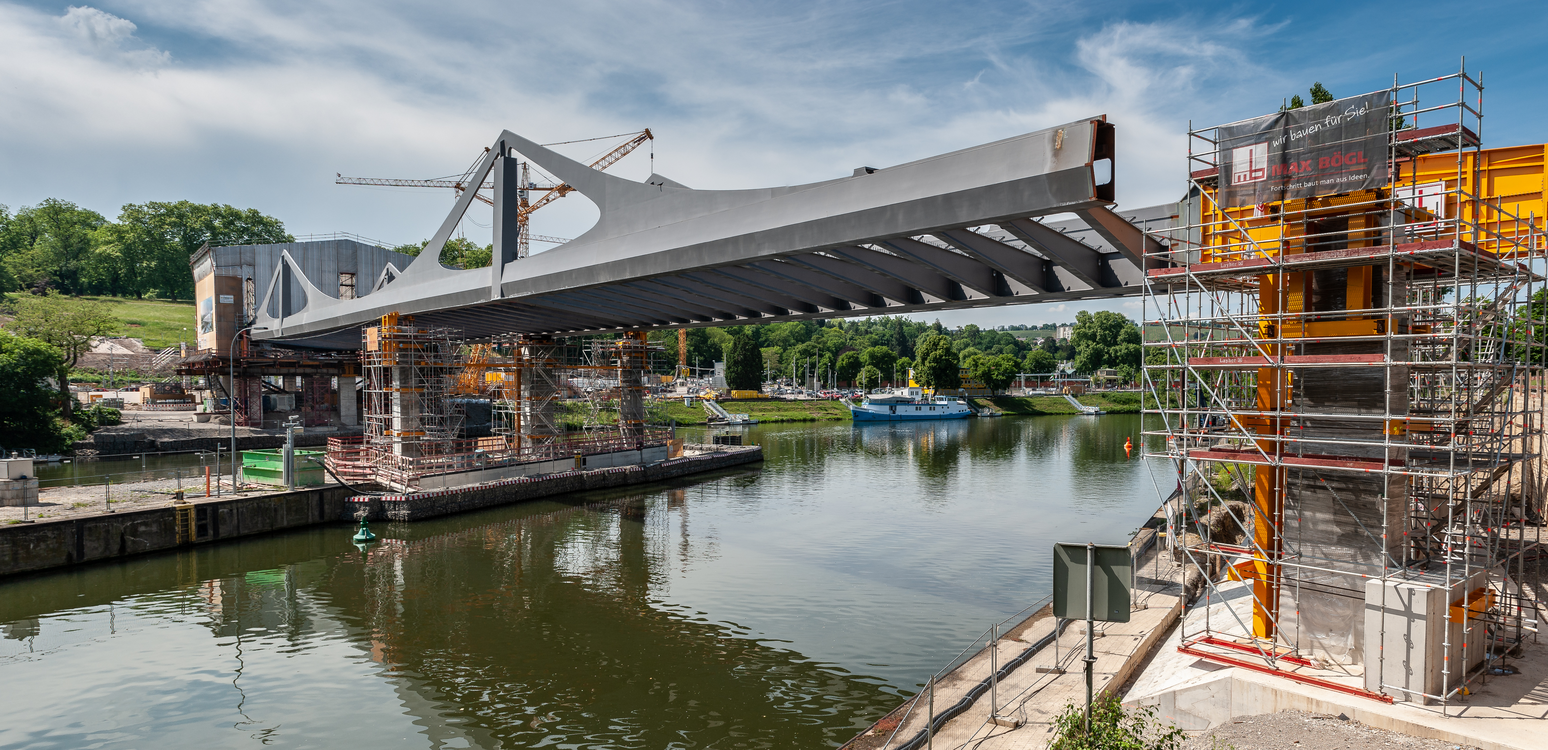 Neue Neckarbrücke Stuttgart, Bauzustand Mai 2018